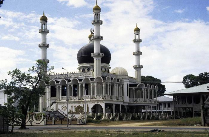 Dia. De nieuwe stadsmoskee van de S.I.V. aan de Keizerstraat. Het terrein aan de Keizerstraat werd in 1931 door de SIV gekocht, waarop er begonnen werd met de bouw van een moskee. De moskee werd in 1932 in gebruik genomen. In 1972 werd de oude moskee gesloopt om plaats te maken voor deze nieuwe moskee, waarvan de eerste steen werd gelegd aan de vooravond van 100 jaar Hindostaanse immigratie, op 3 juni 1973.. De moskee van de Ahmadiyya beweging aan de Keizerstraat